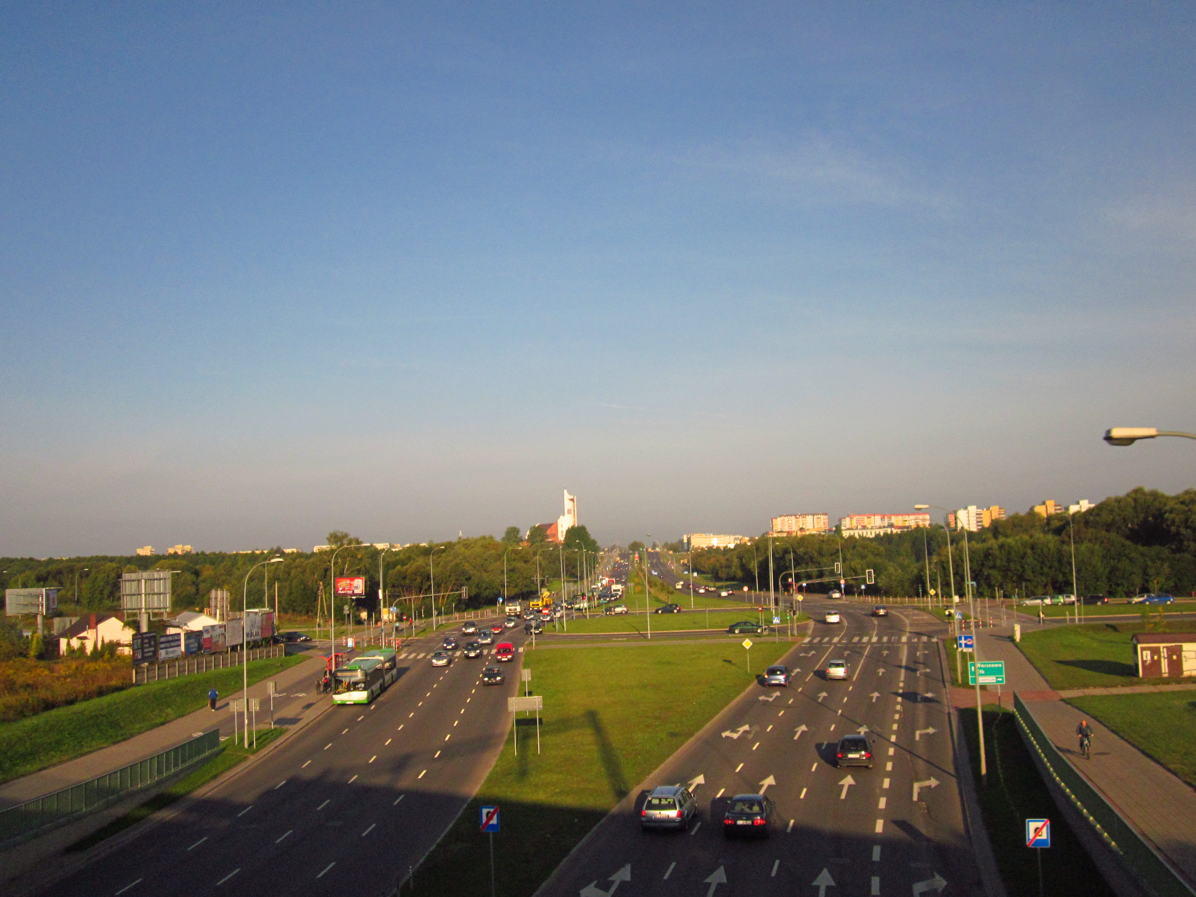 Białystok; ul. Popiełuszki, ul. Fieldorfa "Nila" oraz plac-rondo Fieldorfa "Nila", widok z mostu Fieldorfa-Nila